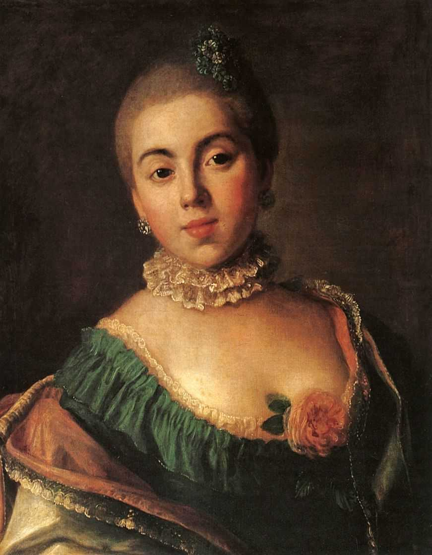 Ротари Пьетро Антонио. Портрет княгини Анны Александровны Голицыной, урож. Строгановой (1739-1816).